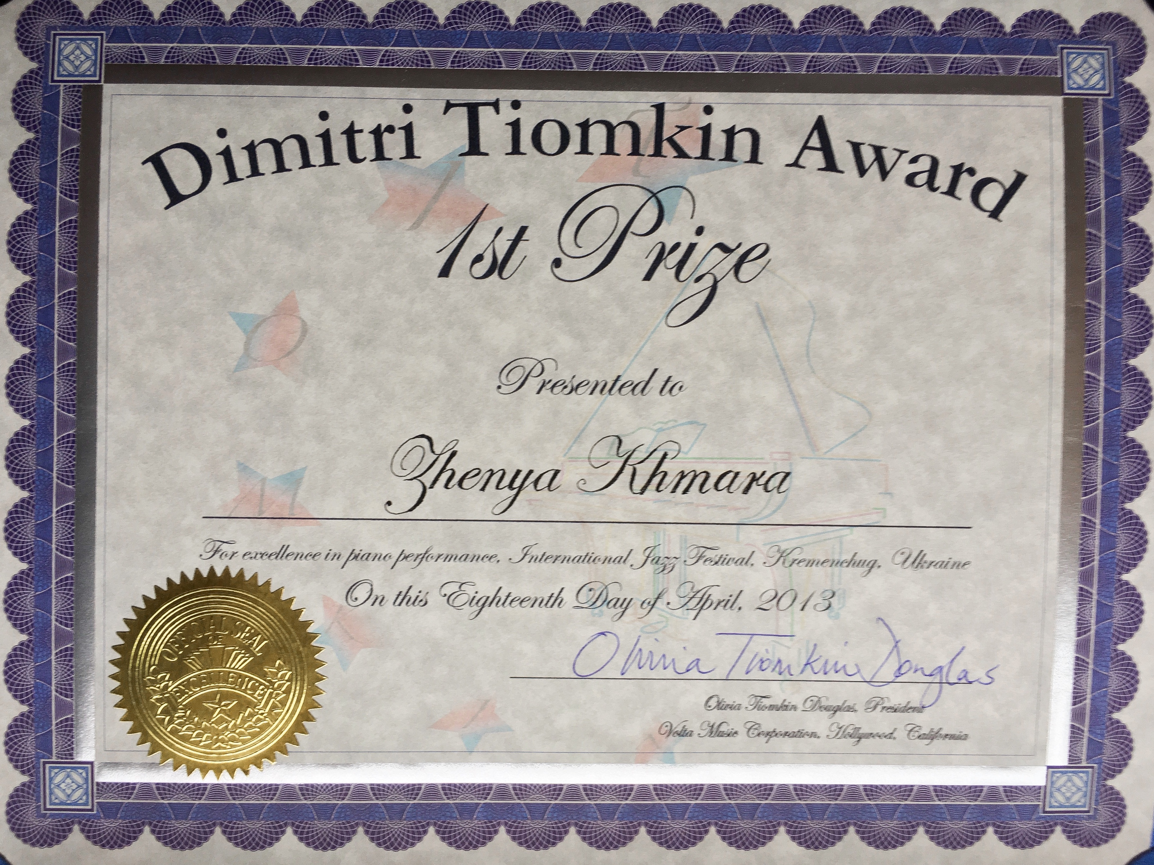 Dimitri Tiomkin Award, 1st Prize (2013)